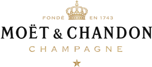 Logo Moët & Chandon